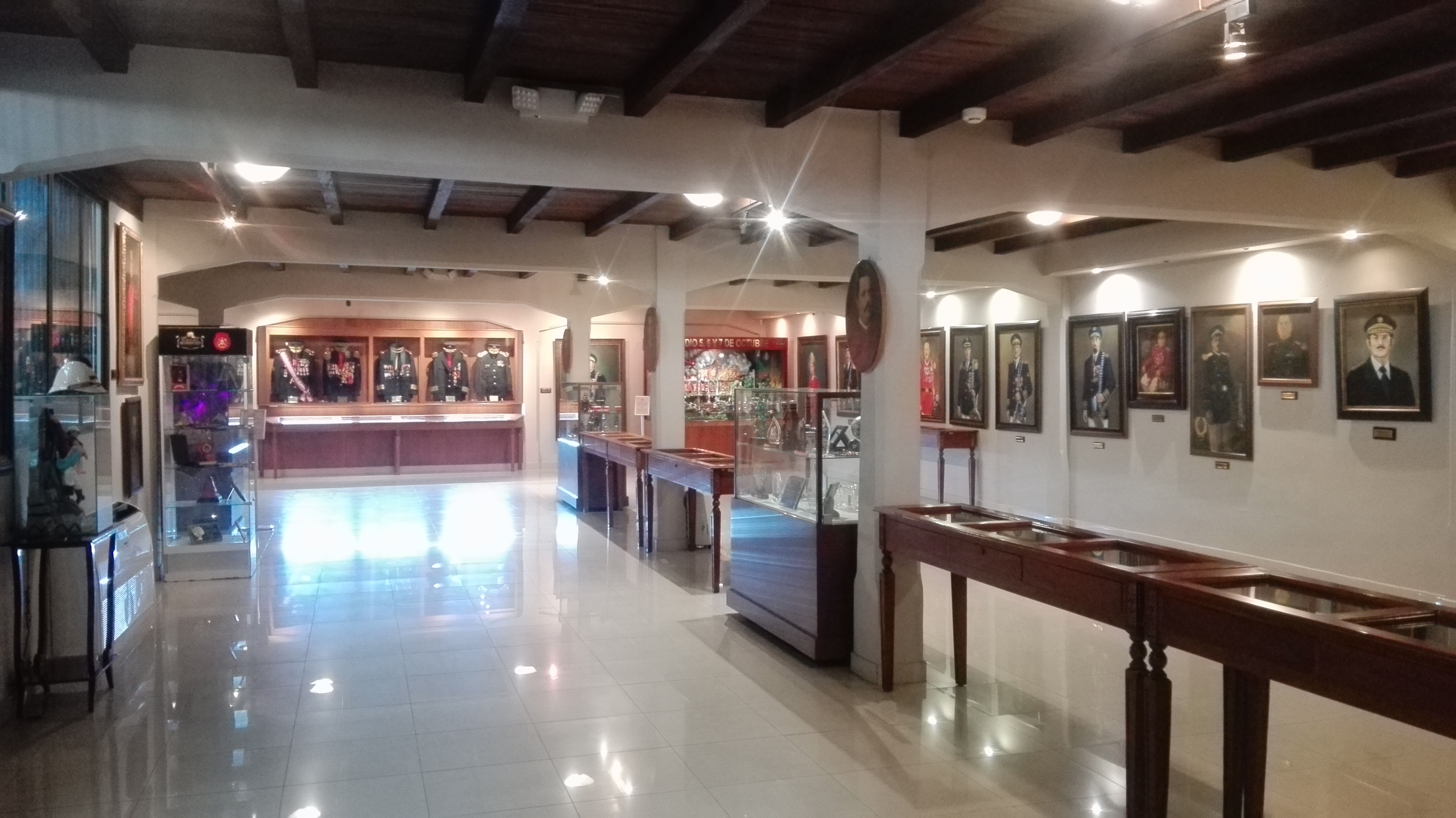 Sala de retratos al óleo de los primeros jefes, medallas y condecoraciones.